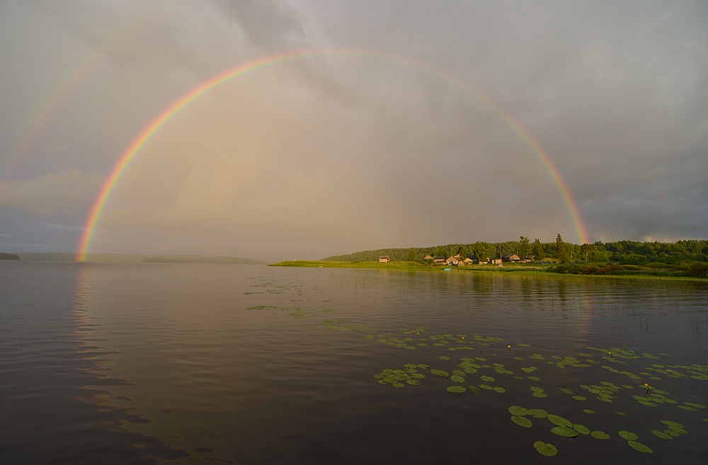 Радуга над Кенозером